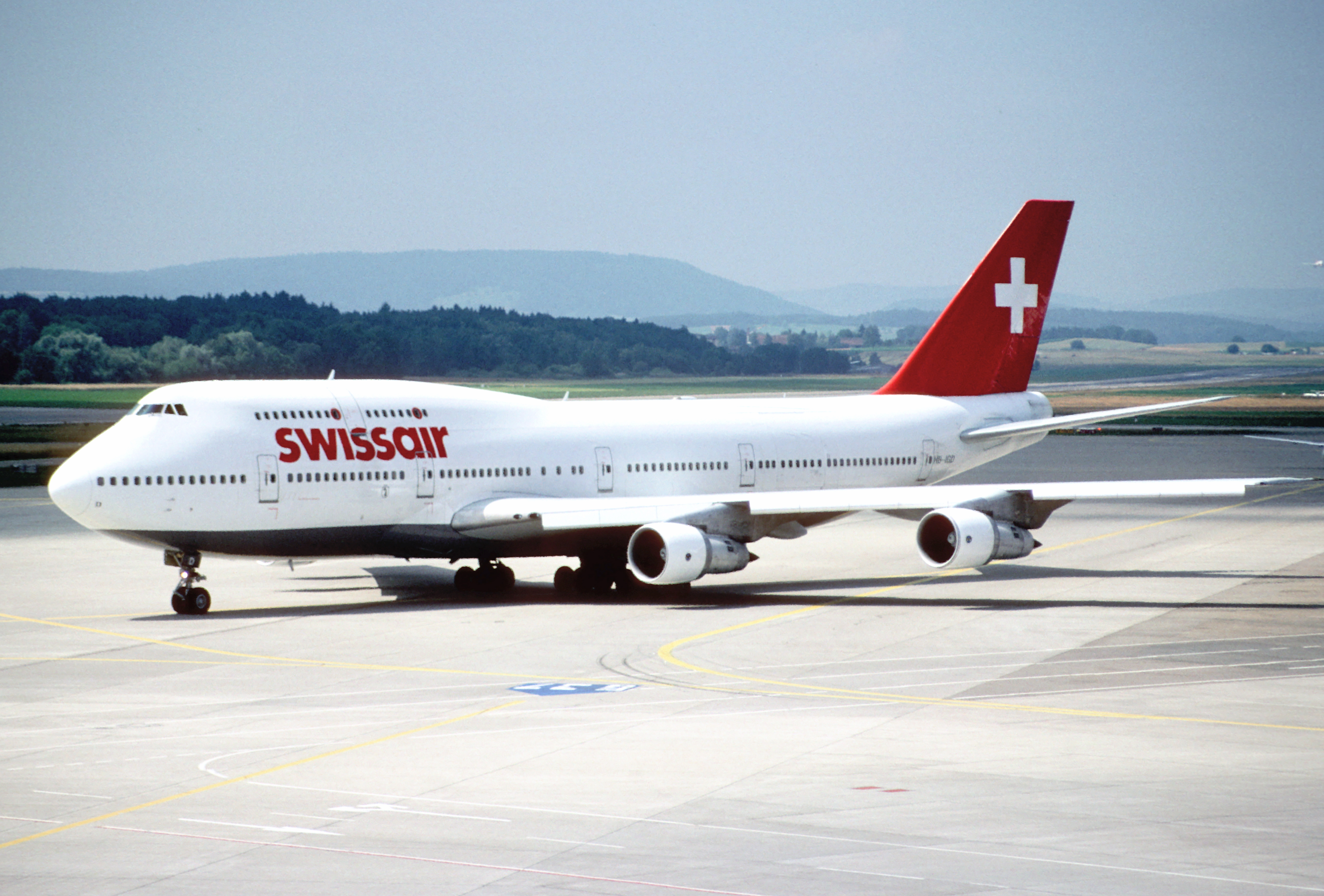 27ag - Swissair Boeing 747-357 (M); HB-IGD@ZRH;04.07.1998